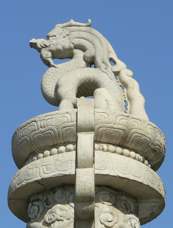 华表顶端的蹬龙（朝天吼） 拍摄